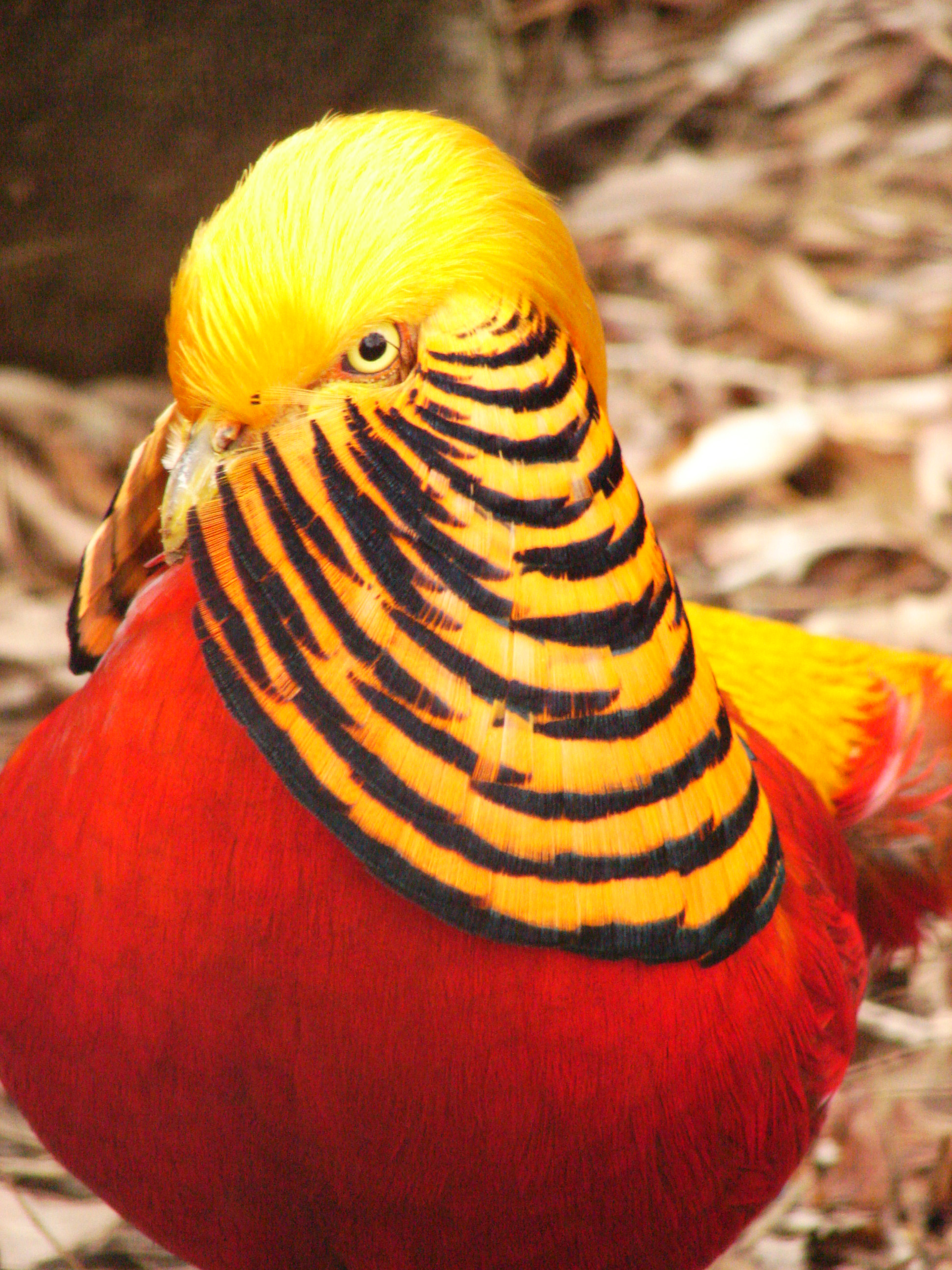 Bogazici Zoo